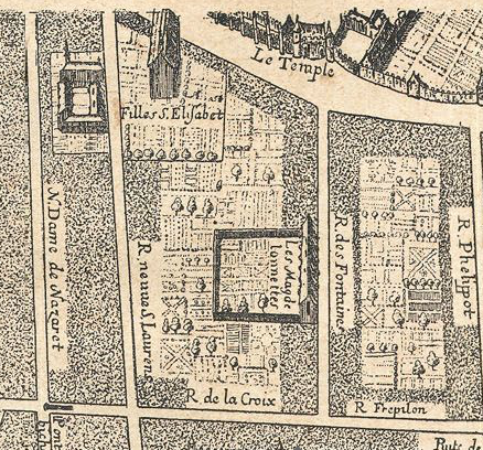 Plan de Gomboust (1652), détail du Couvent des Madelonnettes (rue des Fontaines)